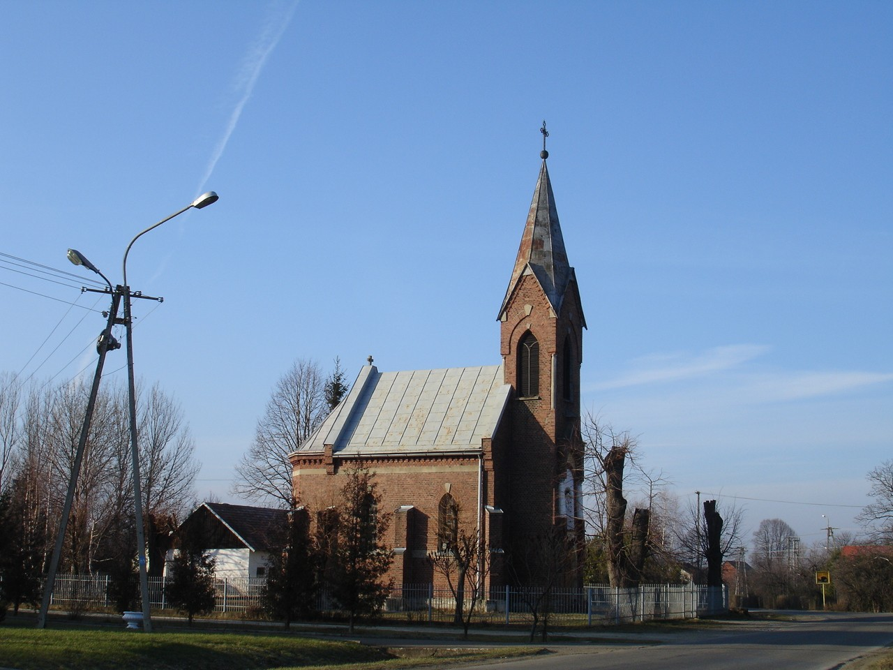 Prusiek - kościół.